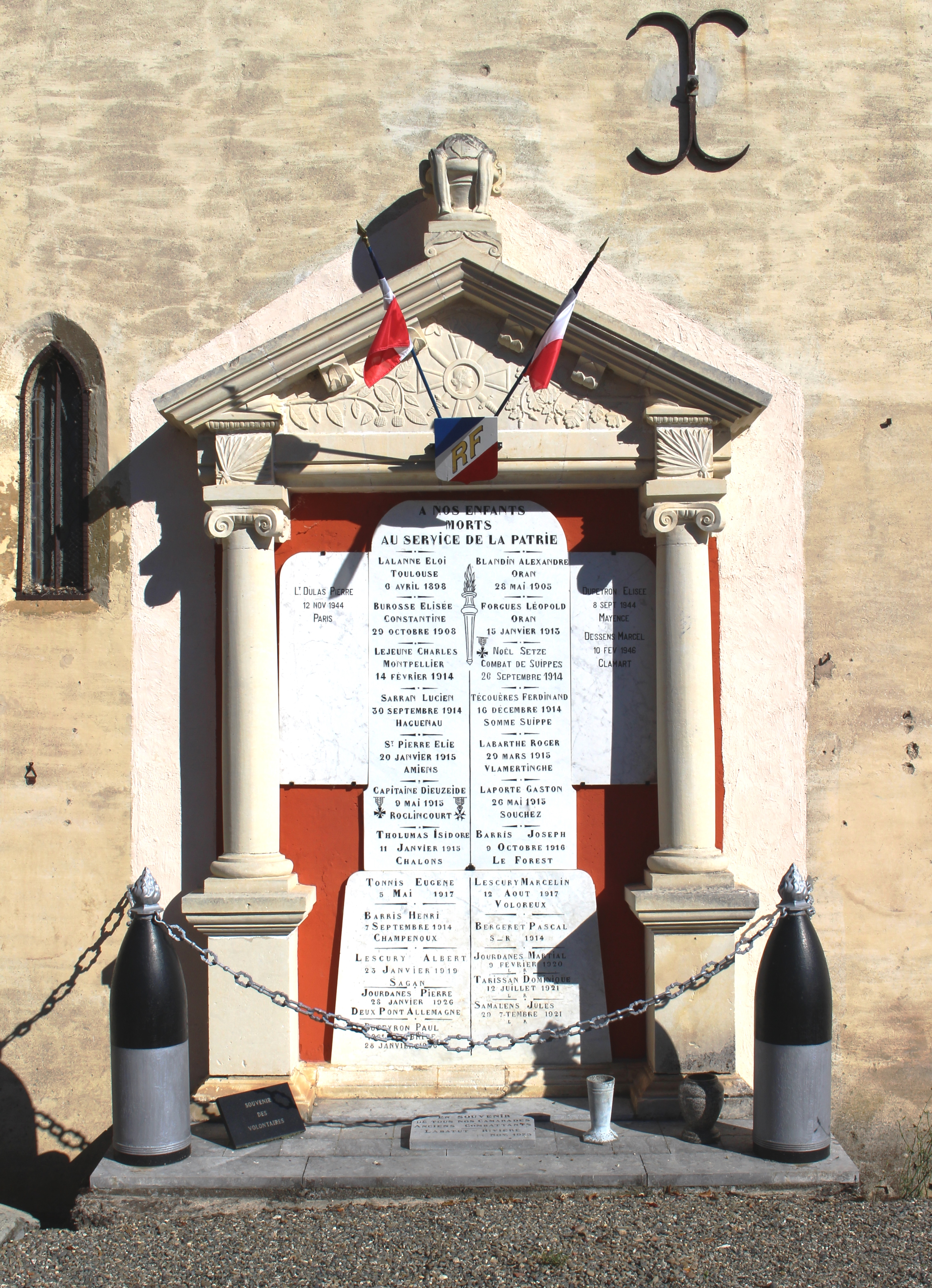 Monument aux morts de Labatut-Rivière (Hautes-Pyrénées)